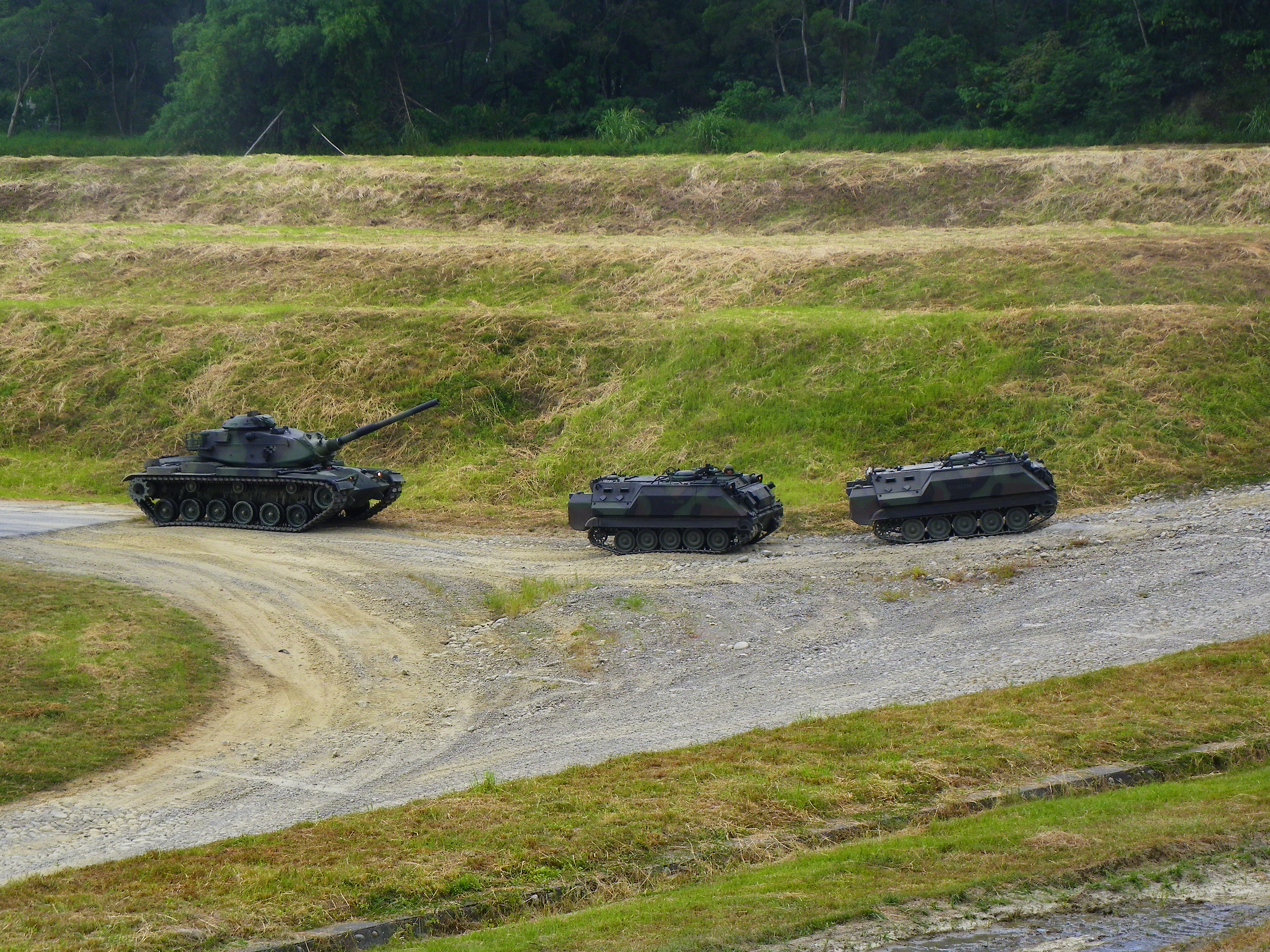 登坡後行駛石礫不整路面的兩輛CM-21A裝甲運兵車與M60A3 TTS戰車。